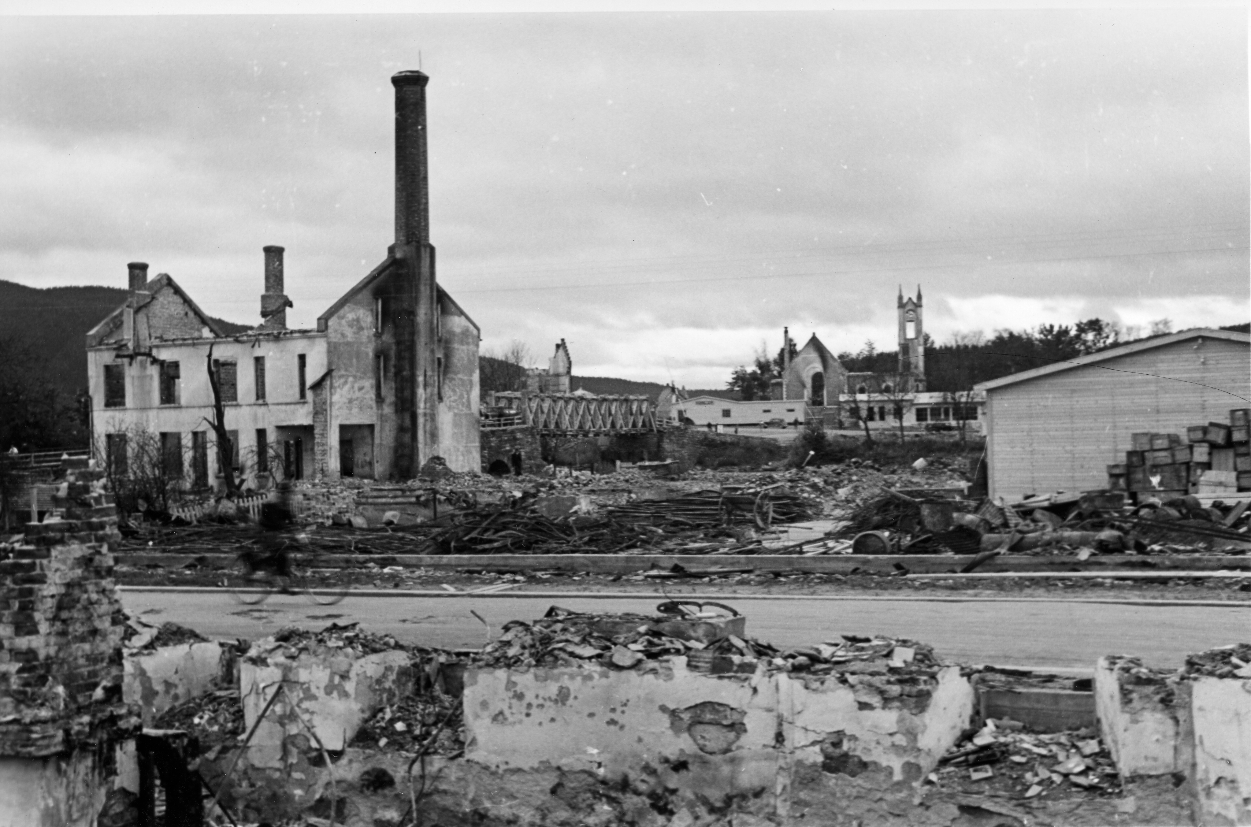 Bildet er hentet fra Arkivverket. Ødeleggelser i ukjent by eller tettsted etter bombing våren 1940. Arkivinstitusjon : Riksarkivet Arkivnavn : Løken, Hallvard Sted : Norge, , , Emneord: 2. verdenskrig, Andre verdenskrig Avbildet